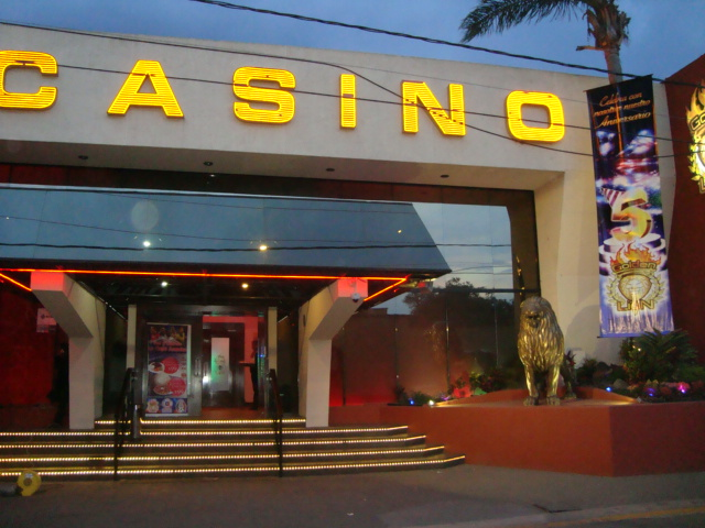 Entrada principal del casino